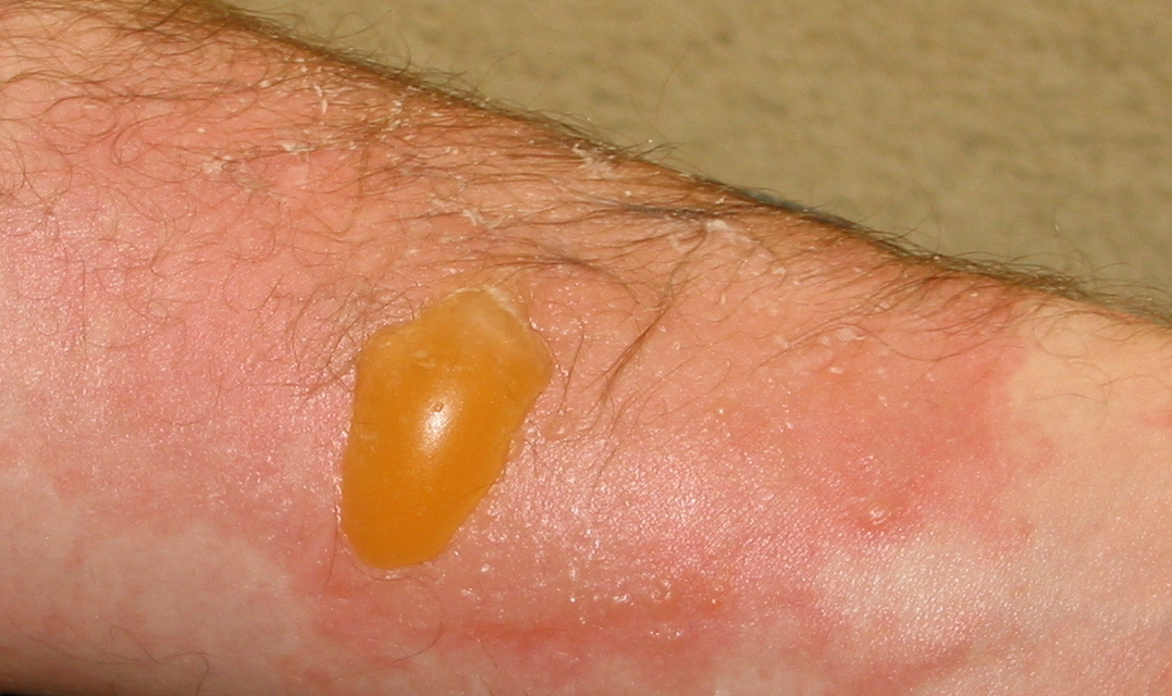 Brandwond graad 2